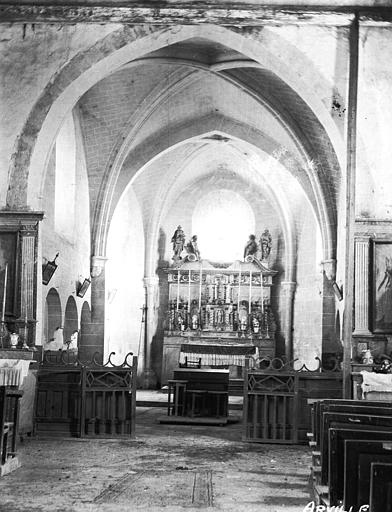 Choeur